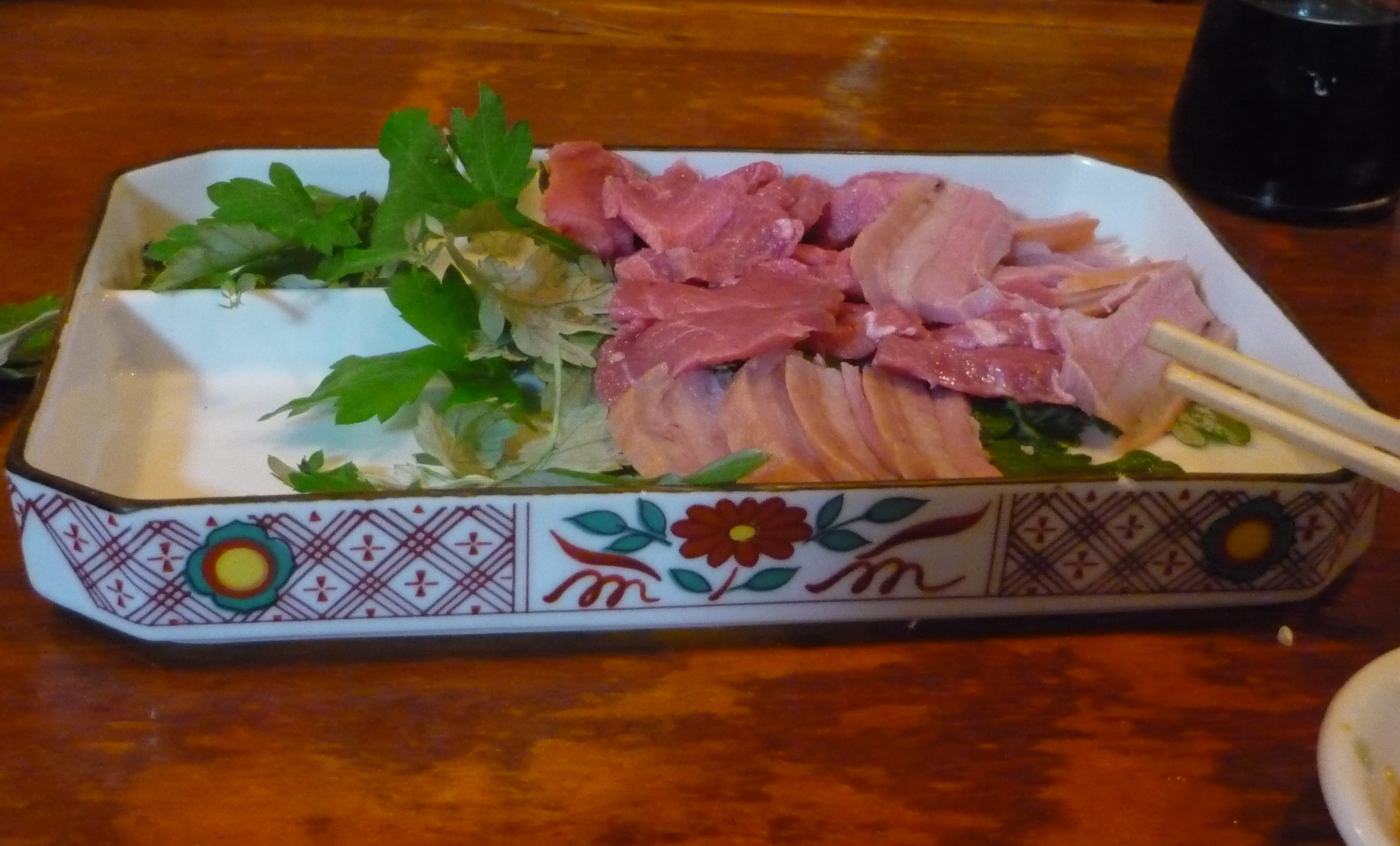 沖縄料理・山羊の刺身（那覇市にて）